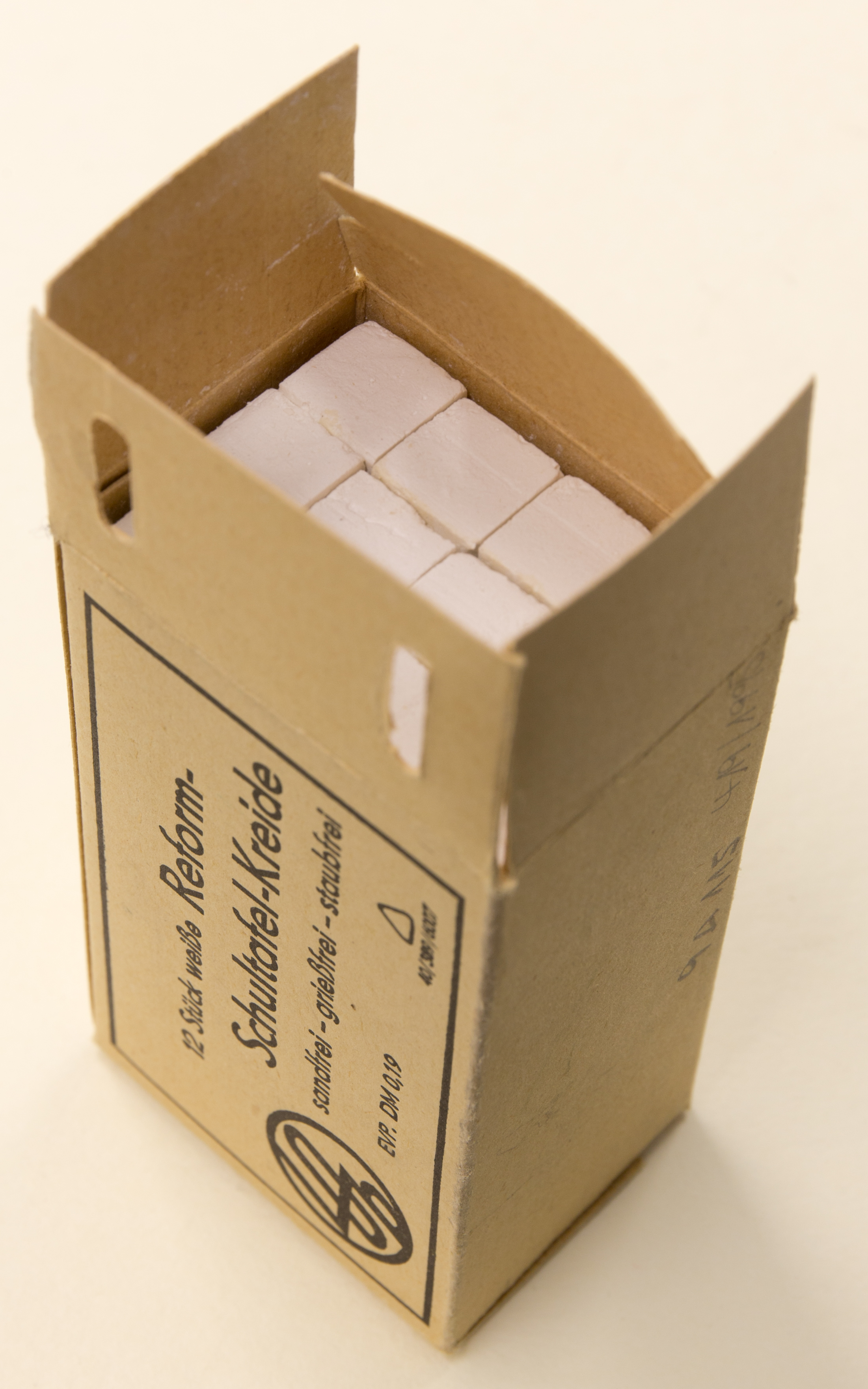 Karton mit Tafelkreide LOB, 12 Stück weiße Reform-Schultafel-Kreide - sandfrei - grießfrei - staubfrei Indetifikations-Nr.: N (9 A 115) 419/1995 Datierung: 1960-1989 Herkunft: Berlin (Ost), DDR Herstellungsort: DDR Höhe x Breite x Tiefe: 4 x 9 x 5,5 cm Ausgabe: Karton, Druck, Kreide Zustand: neu Beschreibung:Karton mit 12 Stück Kreide. Schachtel beidseitig zu öffnen, Steckverschluss. Deckel und Boden der Schachtel weisen den Inhalt aus, dazu Firmenzeichen, Preis und Warennummer.EVP: DM 0,19; Inhalt noch 11 Stück.